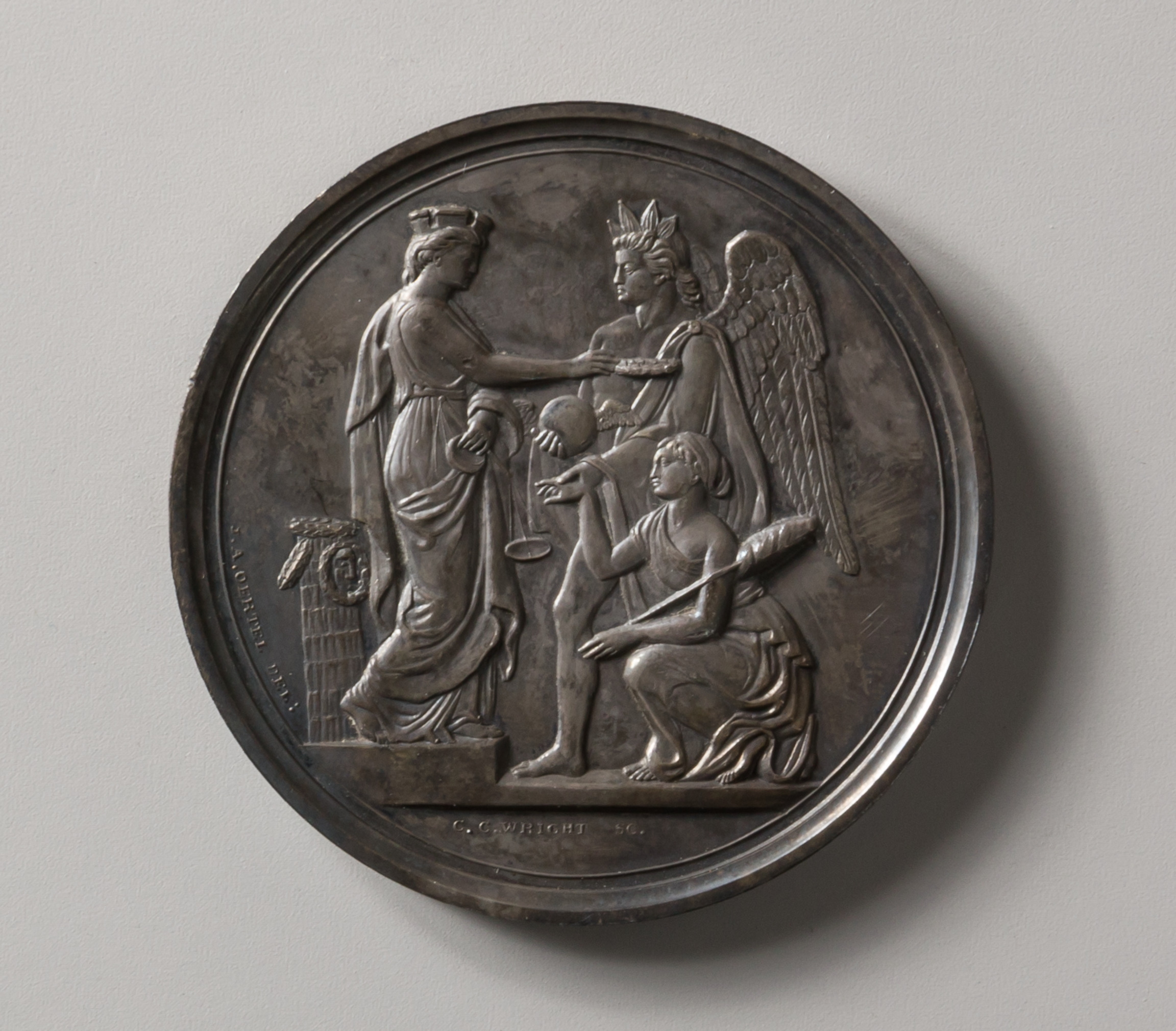 Medal; Sculpture